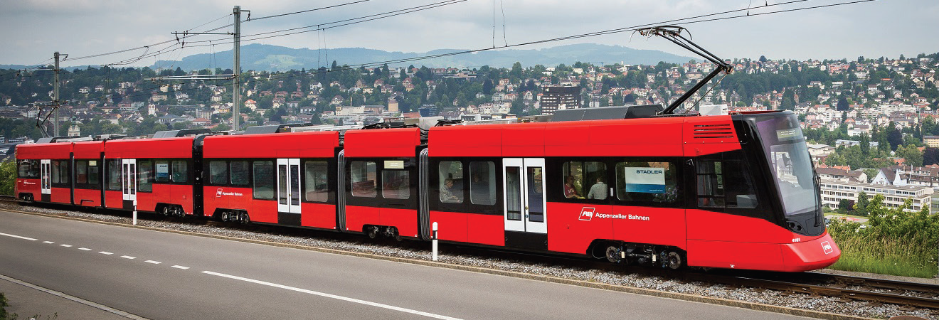 Neuer «Tango»-Zug der Appenzeller Bahnen (AB) oberhalb von St. Gallen unterwegs auf Testfahrt, bevor er im August 2018 in den Fahrgastbetrieb geht. Der Zug 52,6 Meter lang, hat 147 Sitzplätze (davon 12 in der 1. Klasse) und 218 Stehplätze.